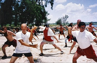 Choy gar Sverige tillsamans med dess kubanska motsvarighet tränar.Sifu Adolfo Tijero till höger och den Kubanske tränaren till vänster.